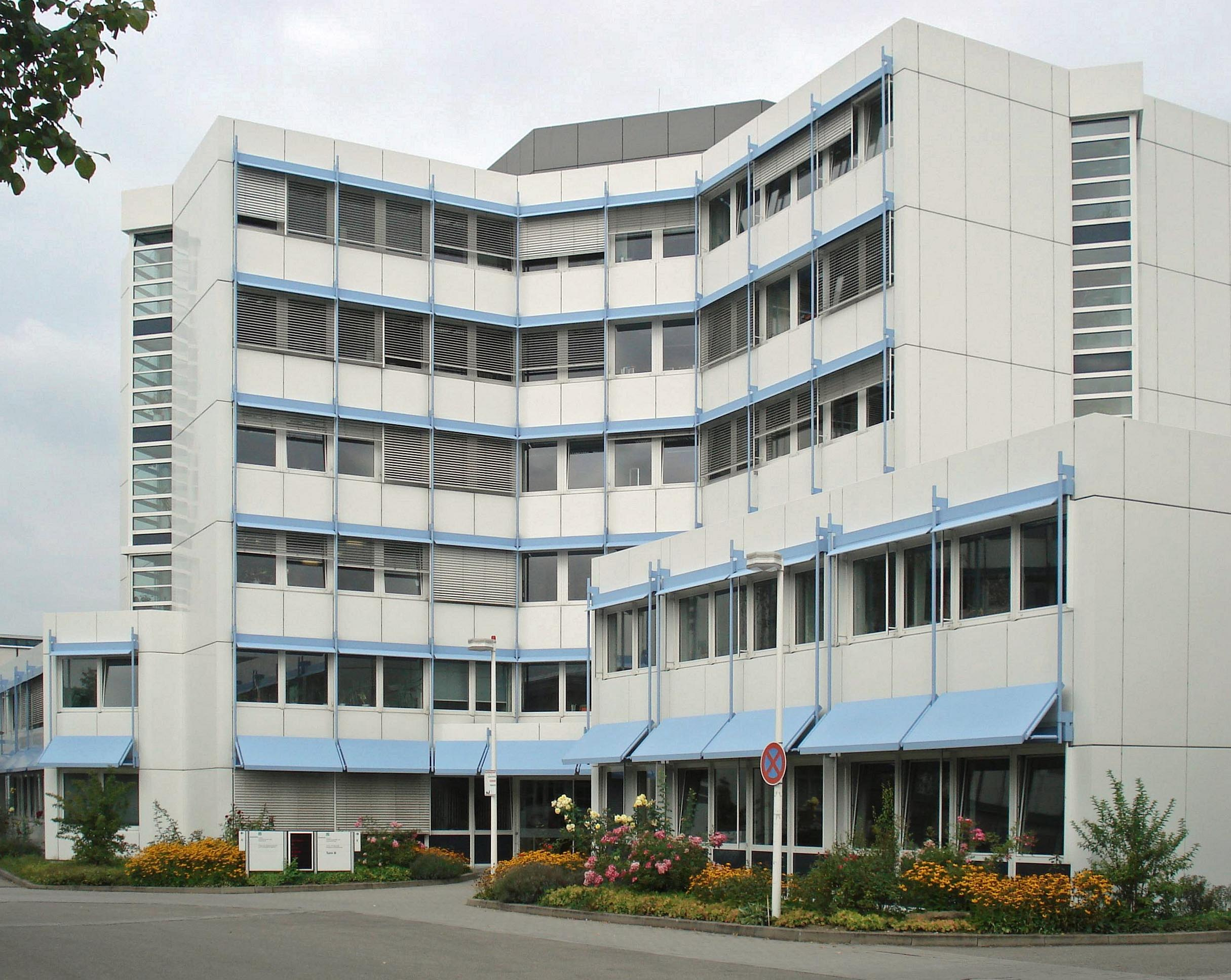 Fraunhofer Institut für Produktionstechnik und Automatisierung